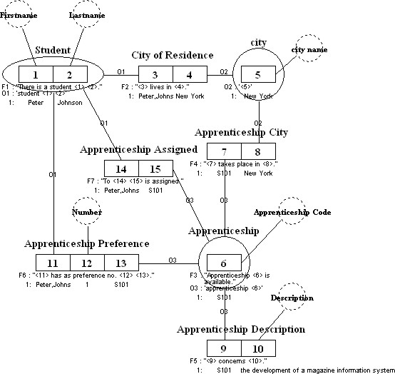 Completer informatie model volgens FCO-IM